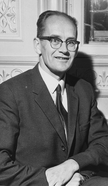 portrett, mann, litteraturhistoriker, professor, sittende halvfigur.